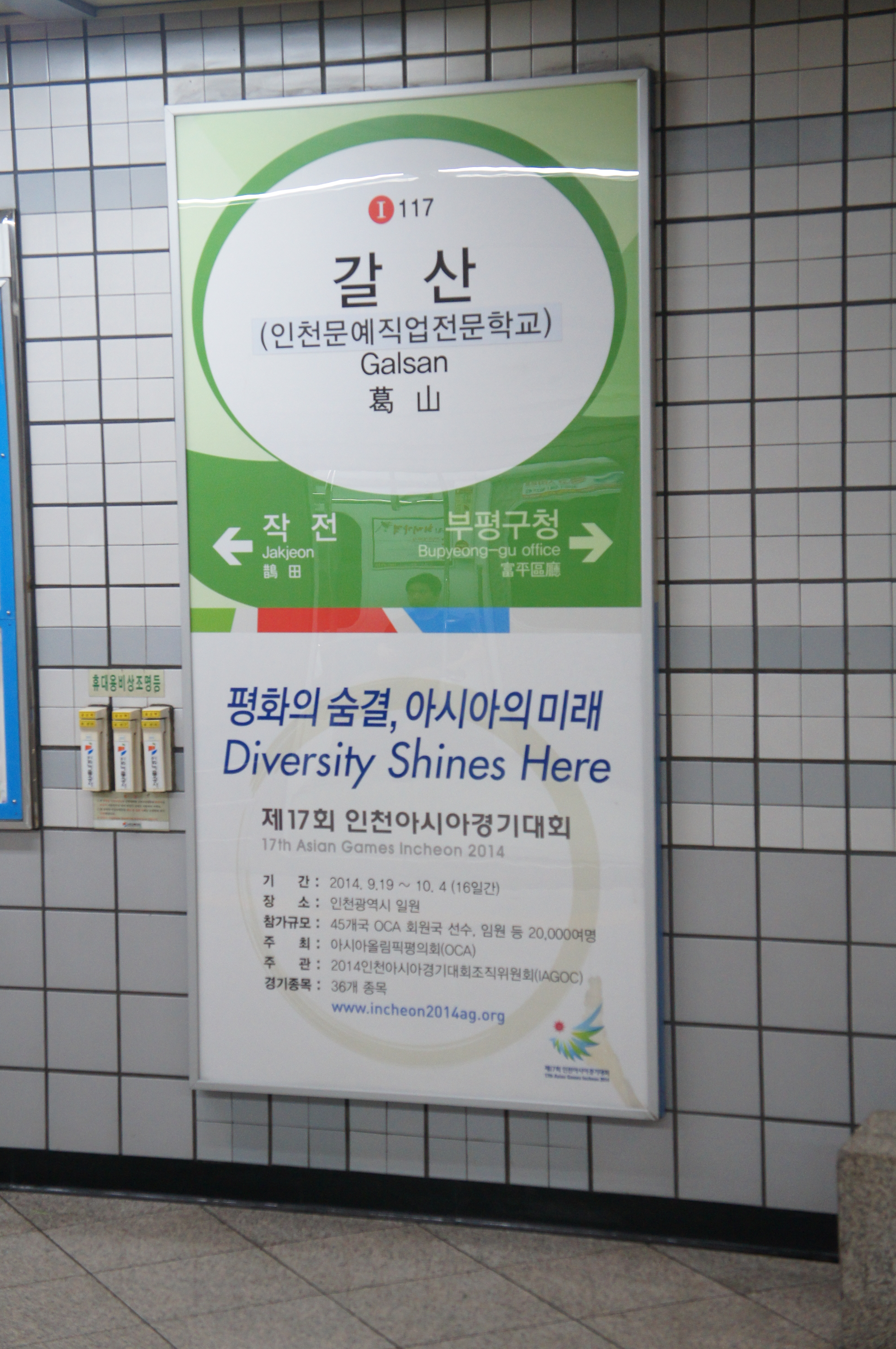 길산역 역명판